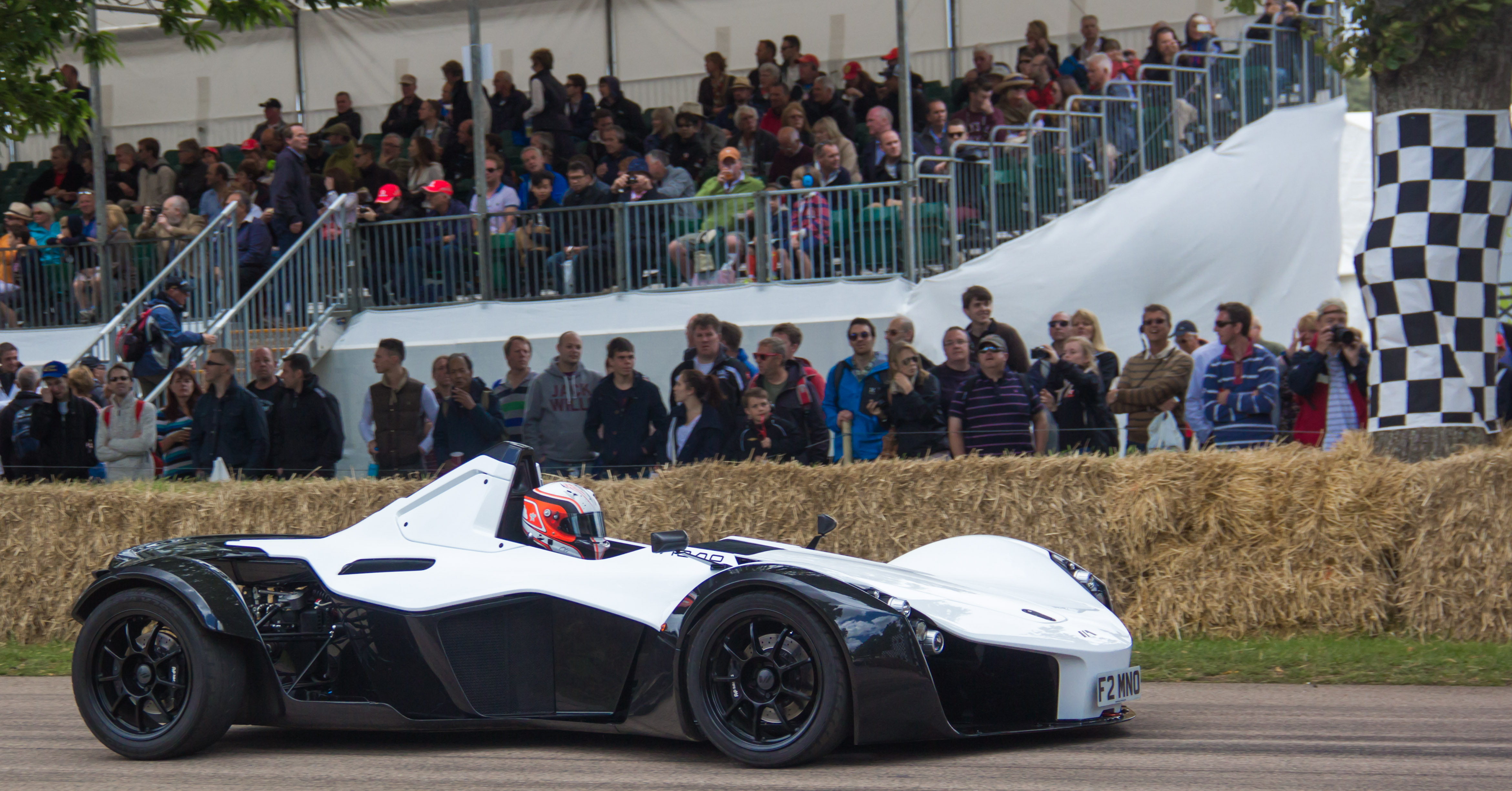 Bac mono